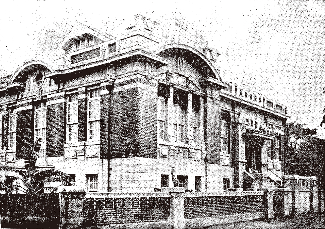 中文（台灣）: 於1923年落成的臺南圖書館，位於台南市花園町。其在二戰後繼續作圖書館使用，直到台南市圖書館總館遷至台南公園內的新館，此處後被轉售予遠東集團，並於1975年興建遠東百貨。